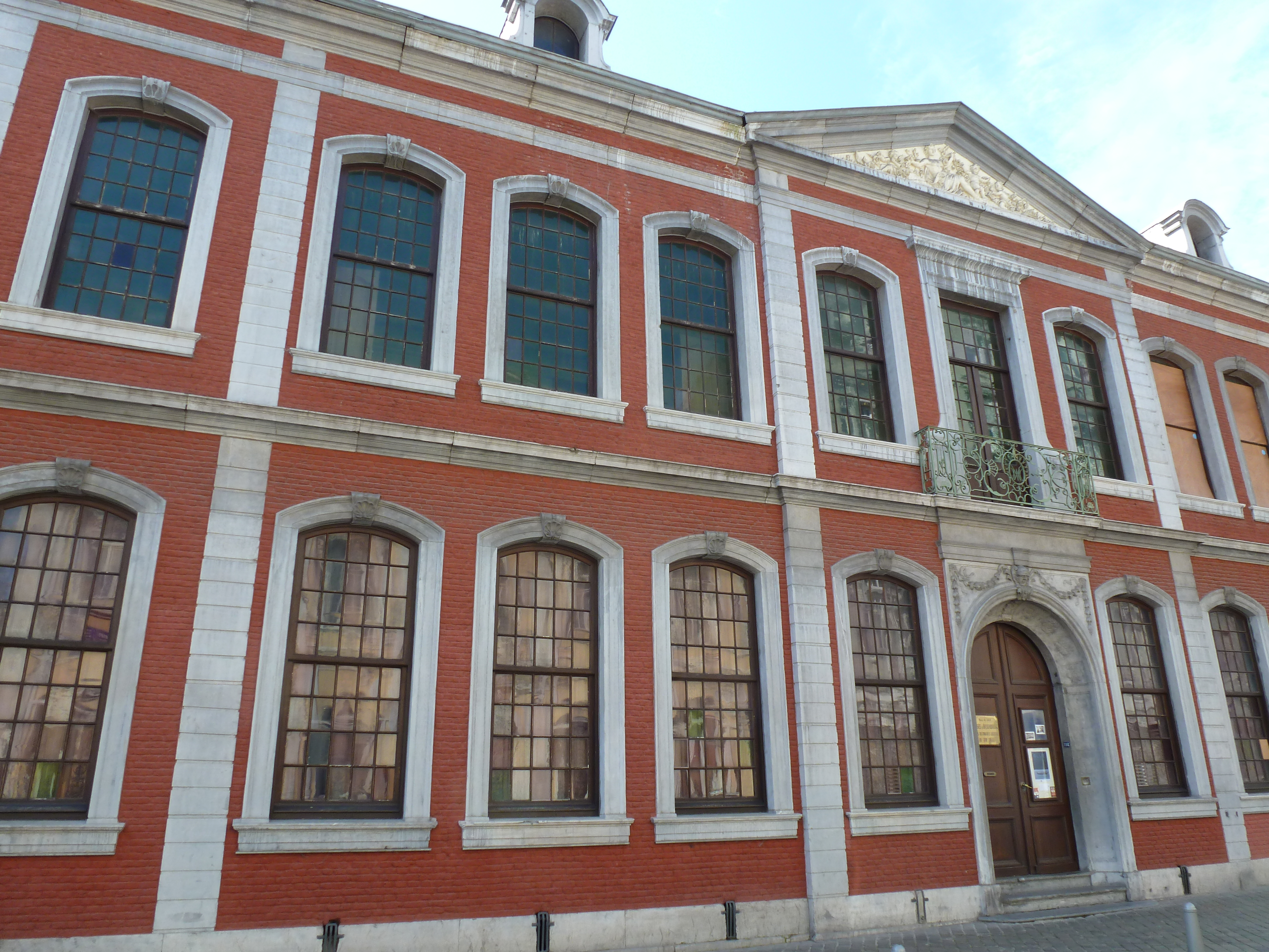 actuellement musée d'Ansembourg